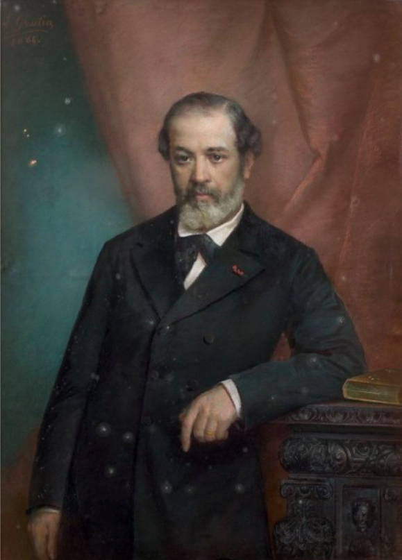 Portrait présumé d'Eugène Pereire (1831-1908) Pastel signé en haut à gauche L. GRATIA/1884. Cadre d'origine en bois et stuc doré. Haut. 118 - Larg. 88 cm Moisissures